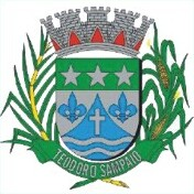 Bandeira de Teodoro Sampaio, estado de São Paulo, Brasil